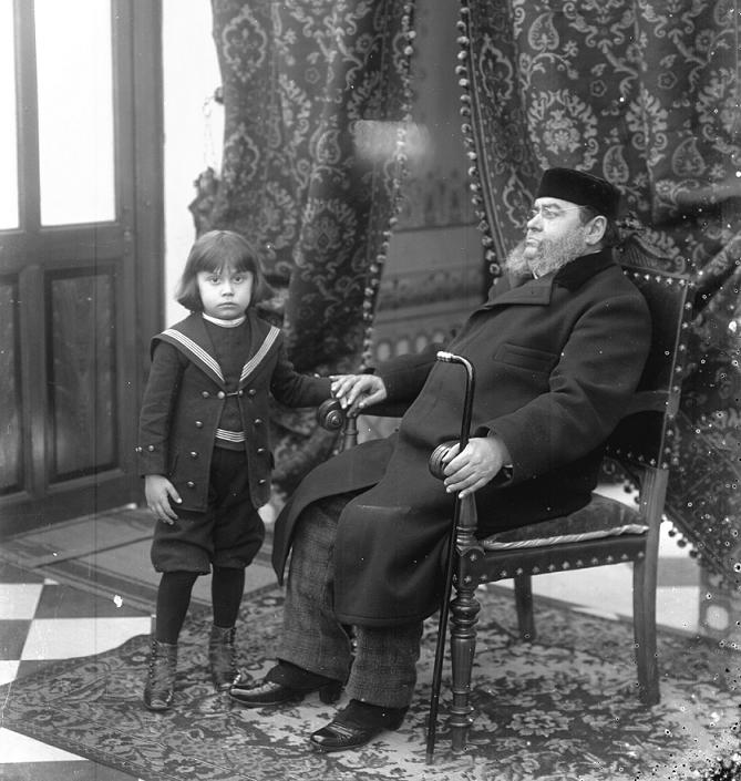 Fotografía del Presidente de Uruguay entre 1897 y 1903, Juan Lindolfo Cuestas con uno de sus nietos.